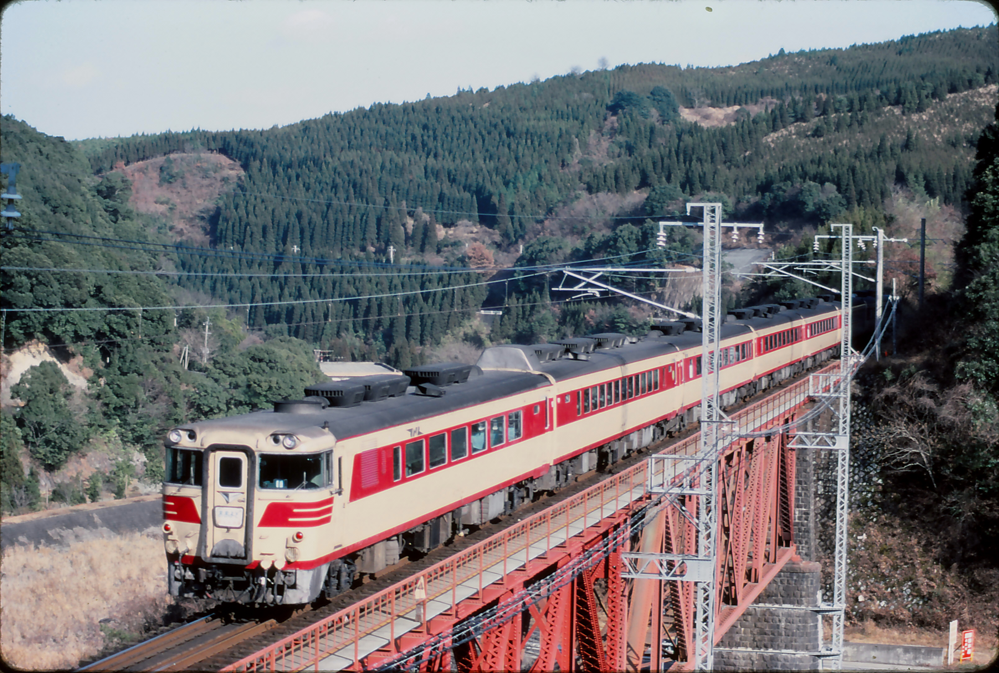 特急 おおよど （博多825-宮崎1427 宮崎1642-博多2250） 日豊本線 田野駅－青井岳駅